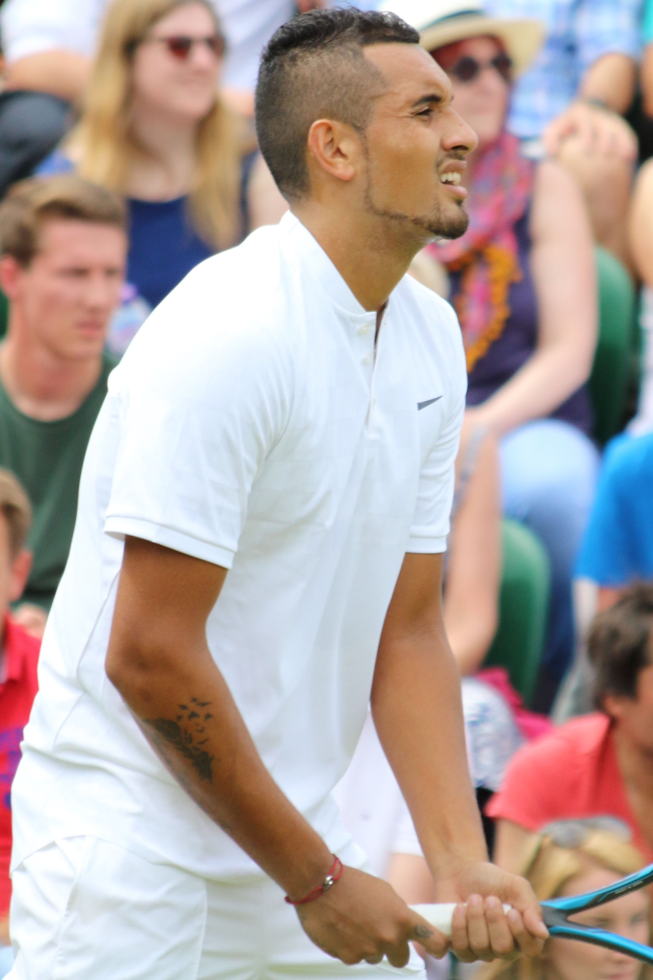 Kyrgios WM17 (5)